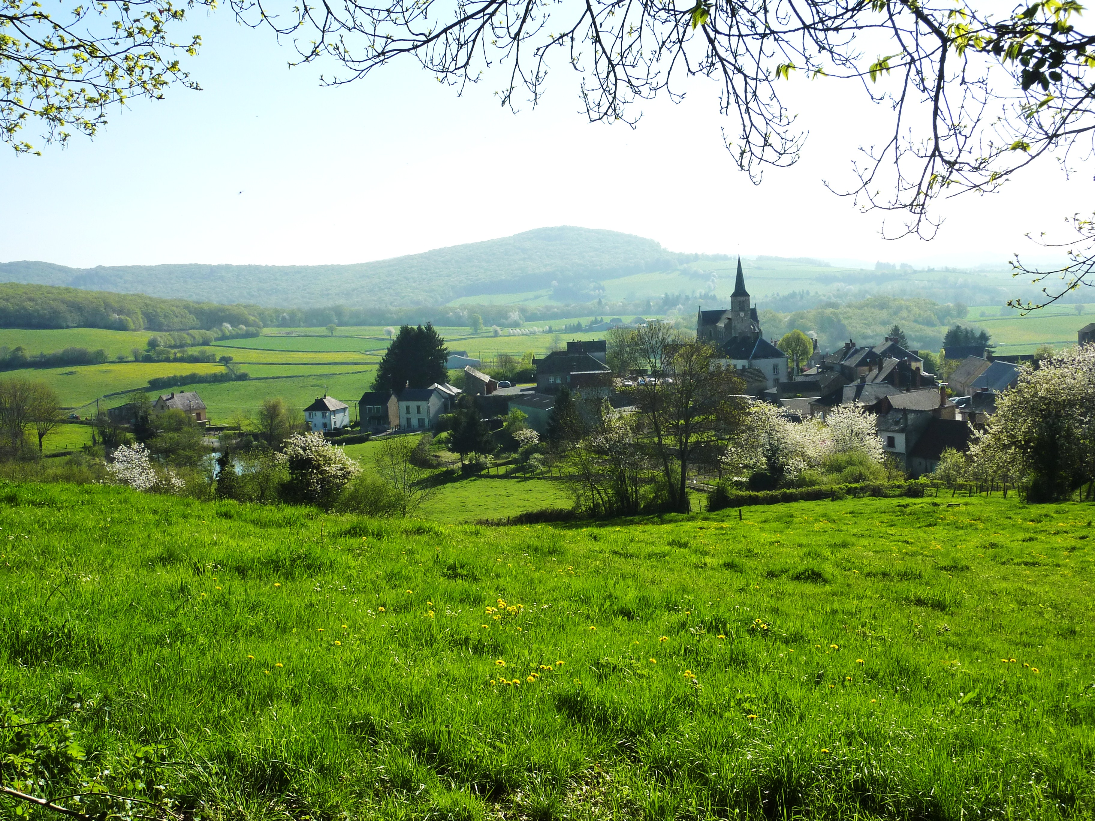 Chiddes (Nièvre) : Vue de Chiddes et du Morvan depuis le mont Charlet